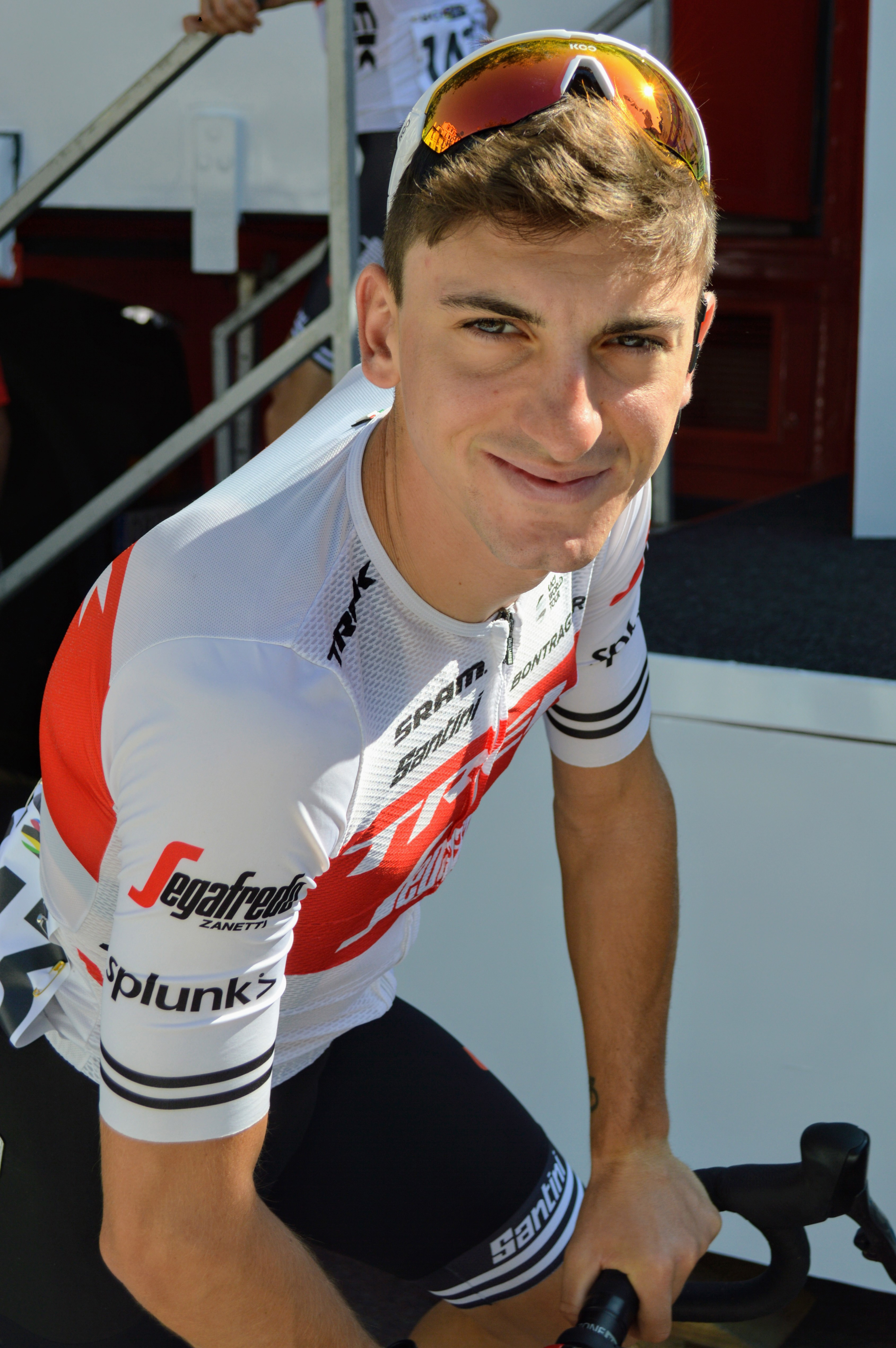 Giulio CICCONE - Août 2019 (Clasica San Sebastian)